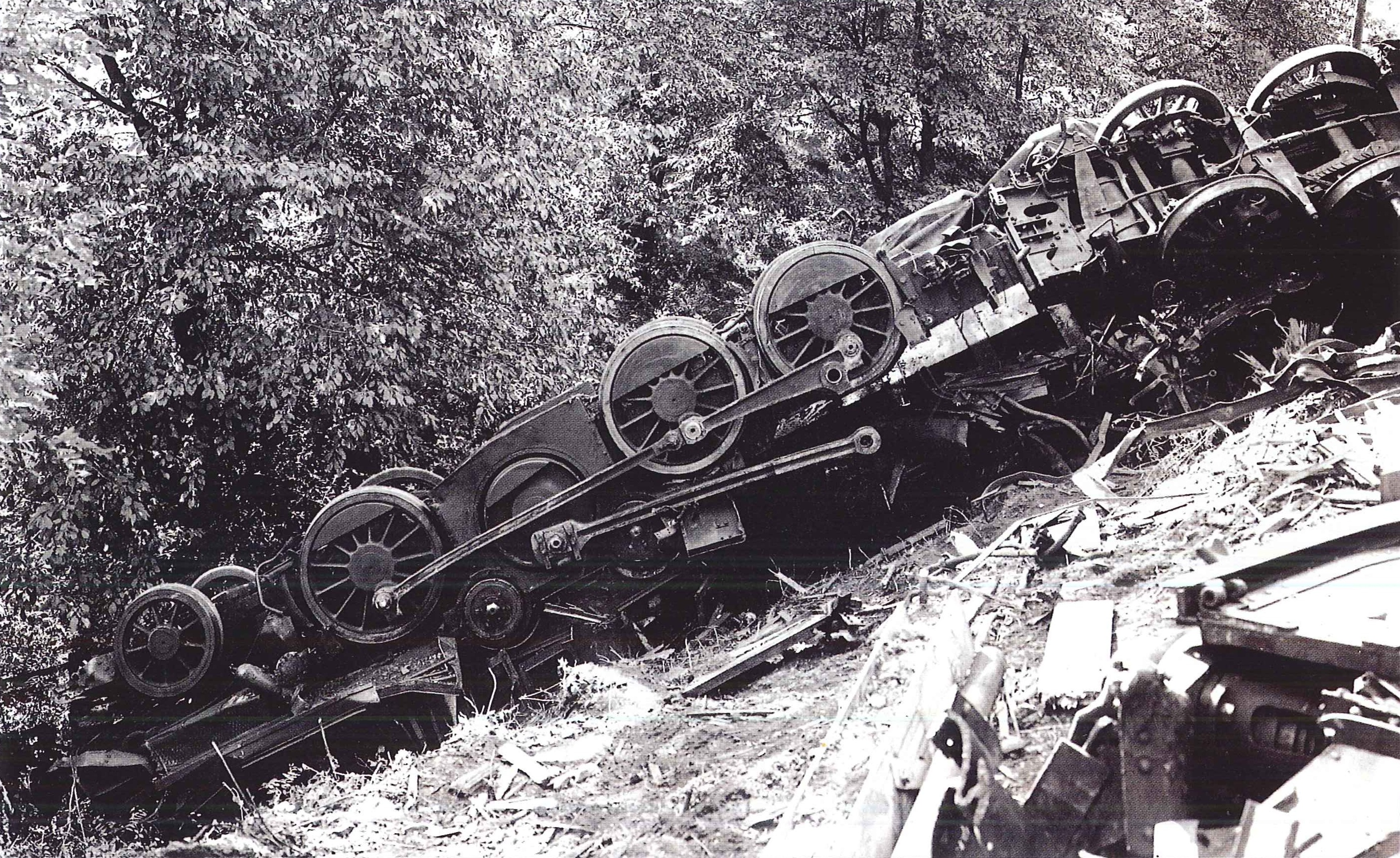 Die Ce 6/8 III 14304 entgleiste mit weit mehr als 100 km/h und schlitterte den Abhang hinunter. Die Lokomotive wurde wieder aufgebaut